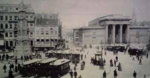 Oude beursgebouw, ontwerp van J.D. Zocher.